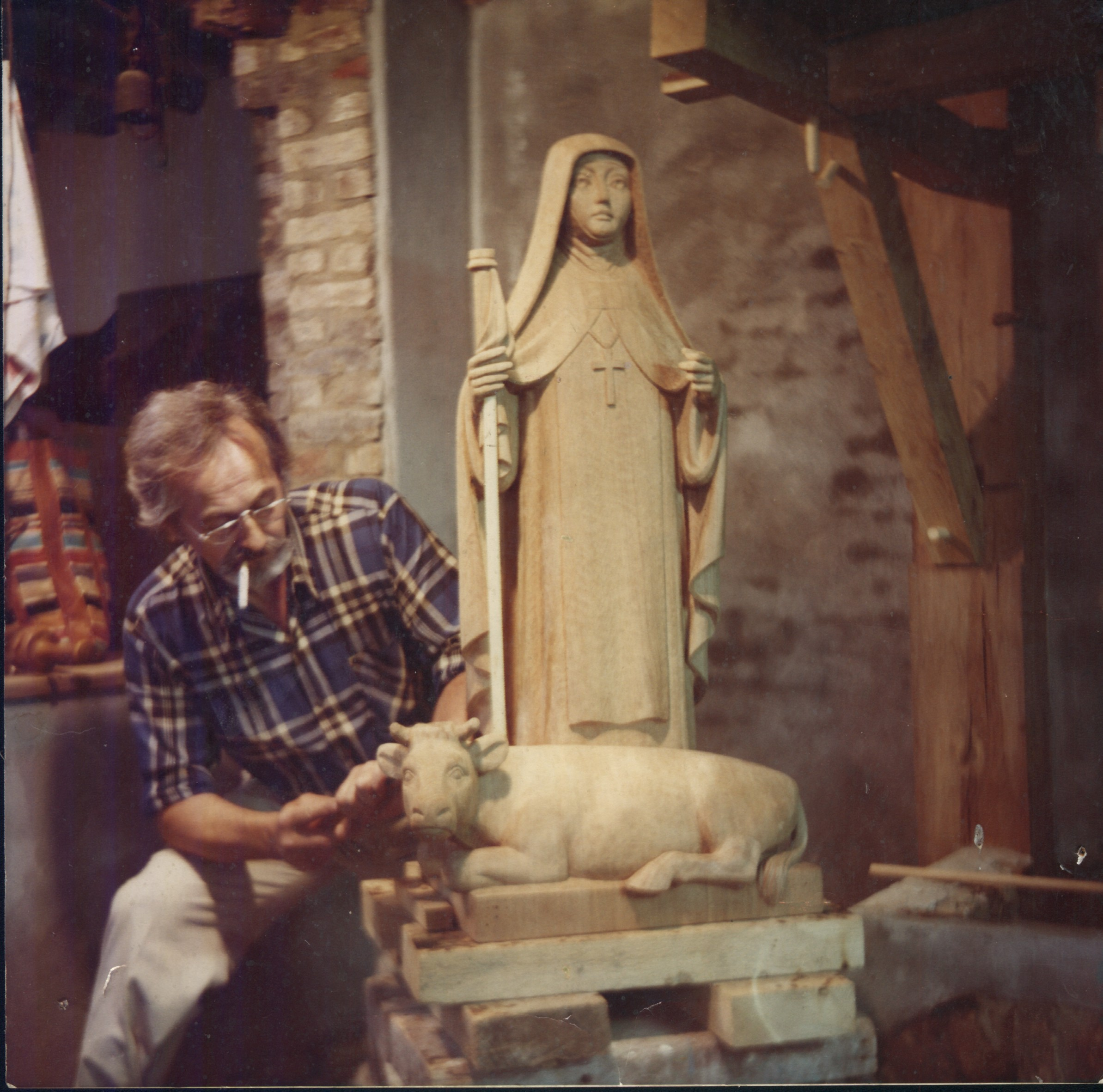 Sjef Eijmael kapt aan het beeld van Sint Brigida (1978)